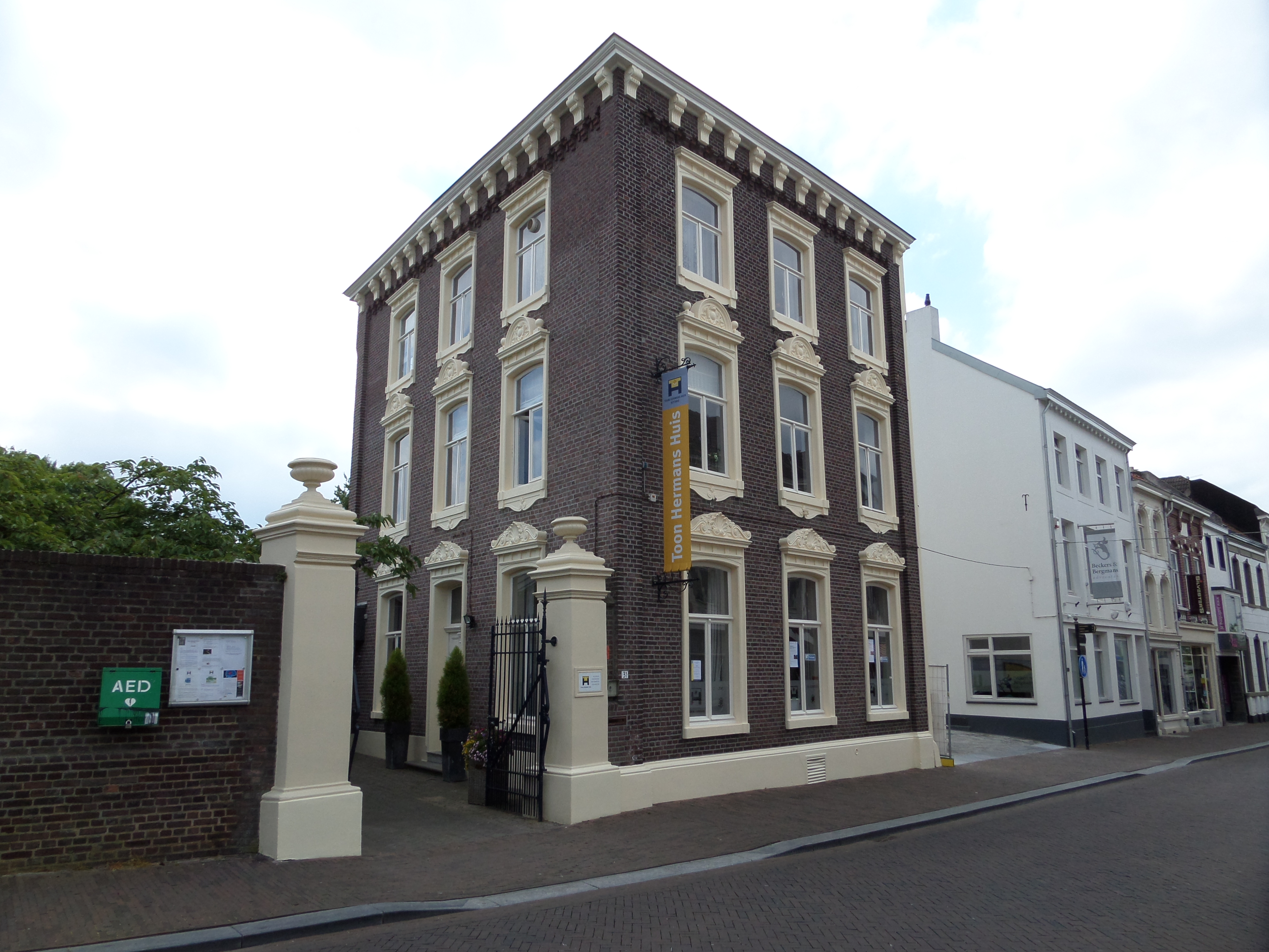 Toon Hermanshuis te Sittard Address Paardestraat 31 6131 HB Sittard Netherlands Date9 June 2015, 13:13:57SourceOwn workAuthorTibor Licensing[edit]